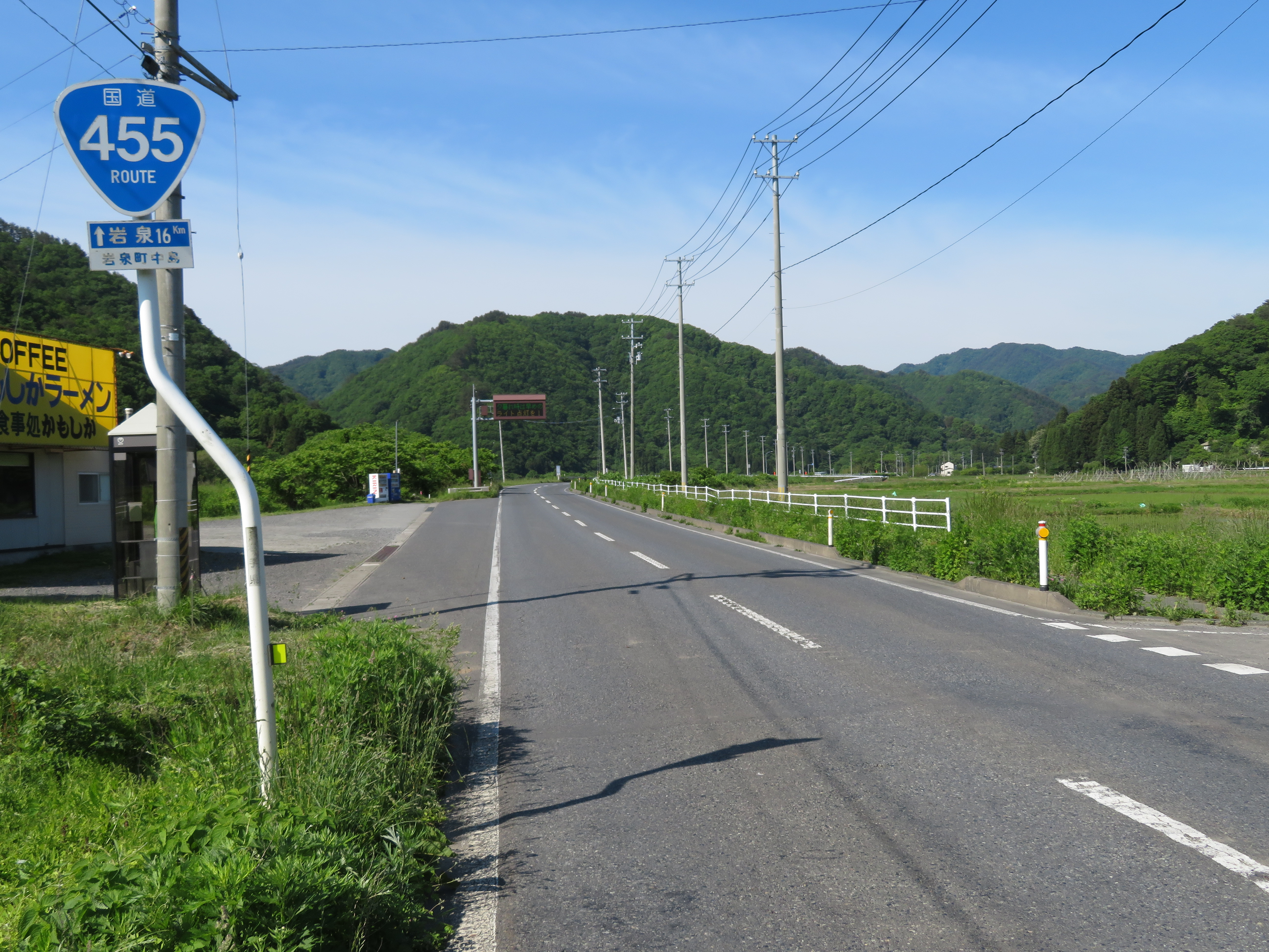 国道455号 岩手県下閉伊郡岩泉町中島高久根付近（盛岡方面を撮影） Canon PowerShot SX720 HS